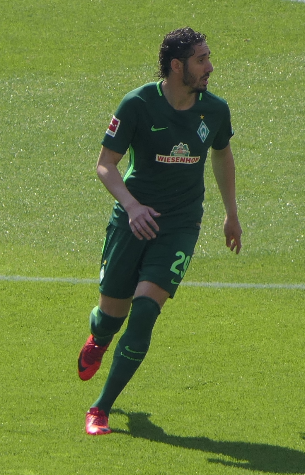 Der Fussballprofi Ishak Belfodil im Trikot vom SV Werder Bremen beim Auswärtsspiel gegen den VfB Stuttgart am 21.04.2018.